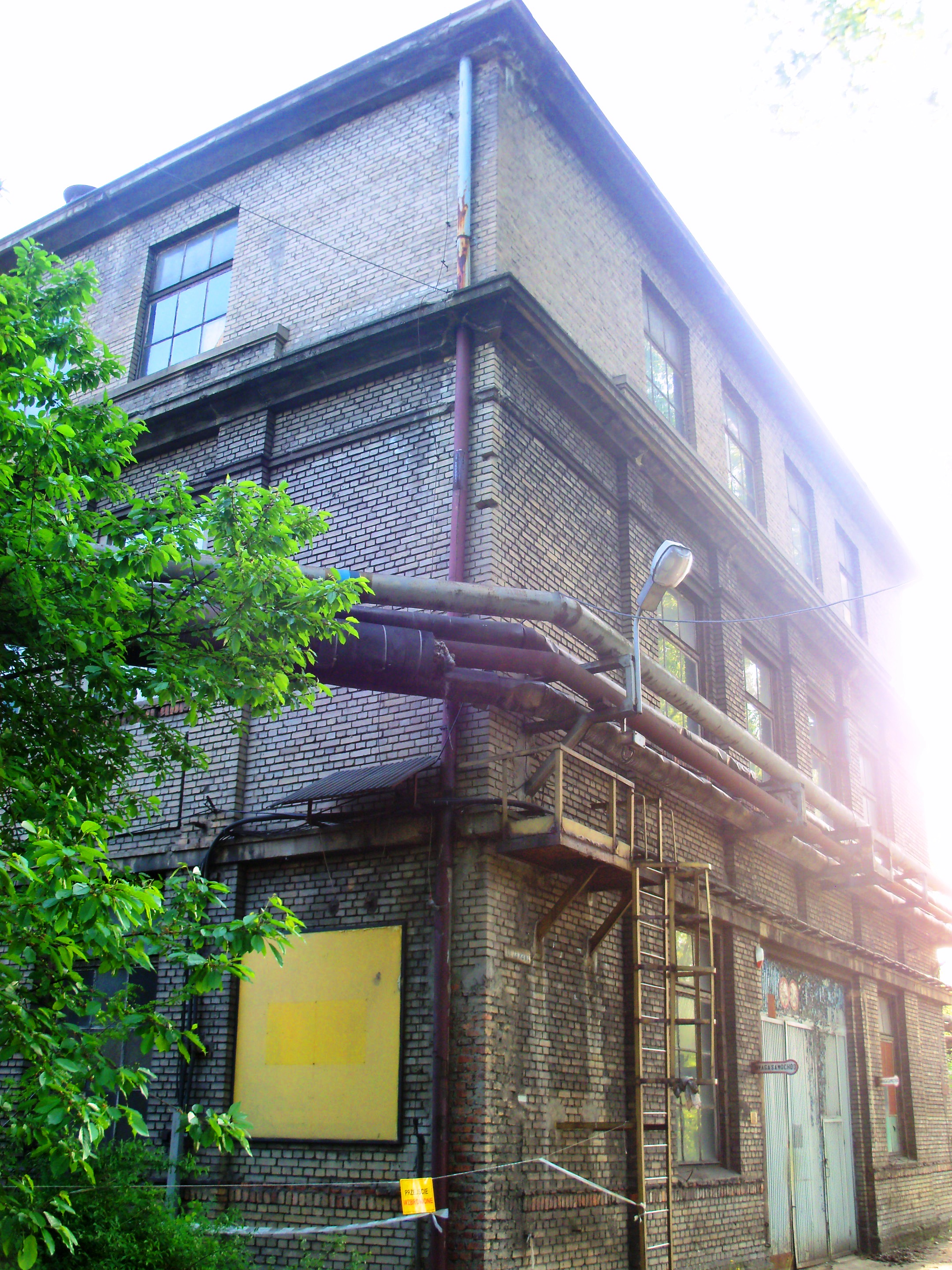 Huta Baildon w Katowicach